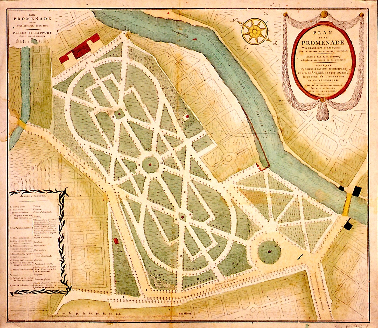 Plan de la promenade à établir à Strasbourg sur le terrain du ci-devant Contades… Strasbourg, Contades, Plan, de P. B. Schmid, ill. et P. J. Dannbach, graveur (18??)